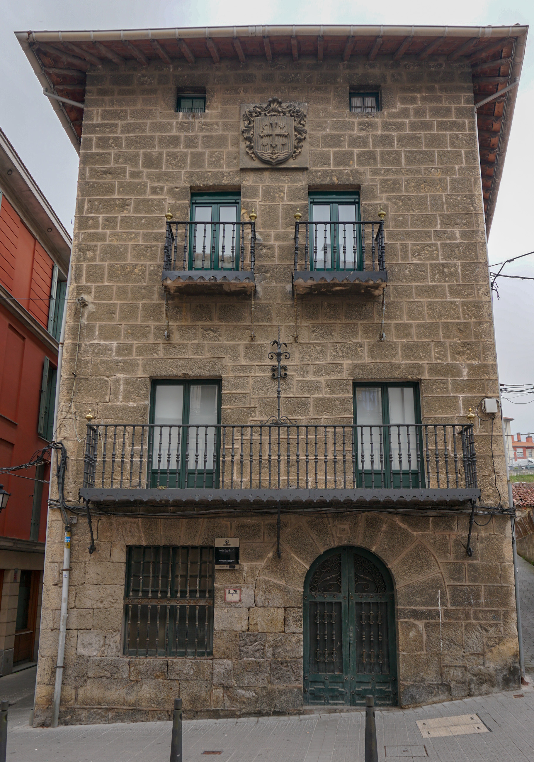 Torre Arteita